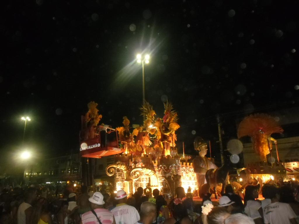 Villa Rica, 2012.